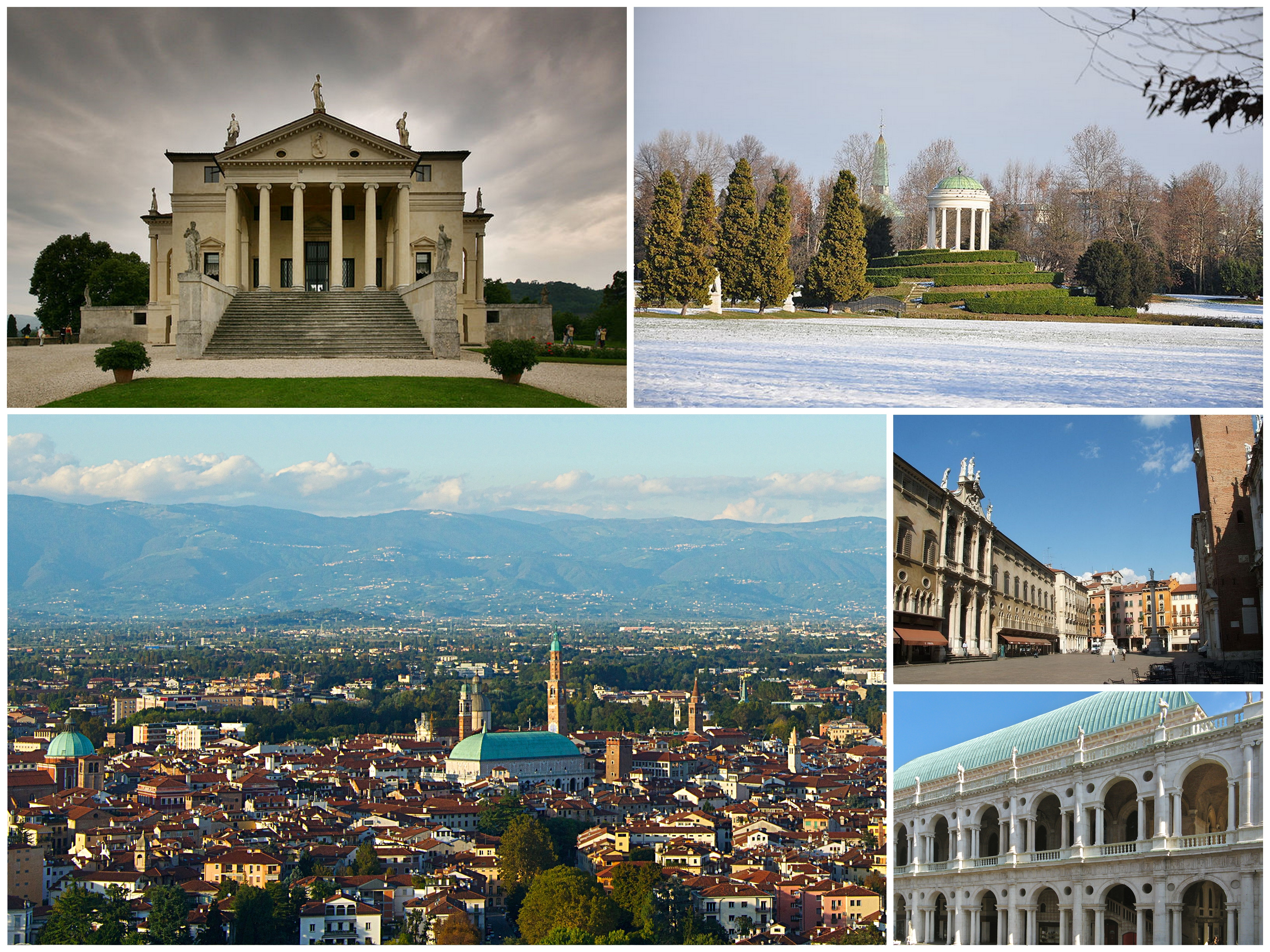 Collage di varie foto di Vicenza. In senso orario dall'alto a sinistra: villa Almerico Capra "La Rotonda", il tempietto di Parco Querini, scorcio di piazza dei Signori, la Basilica Palladiana e una vista della città da Monte Berico.